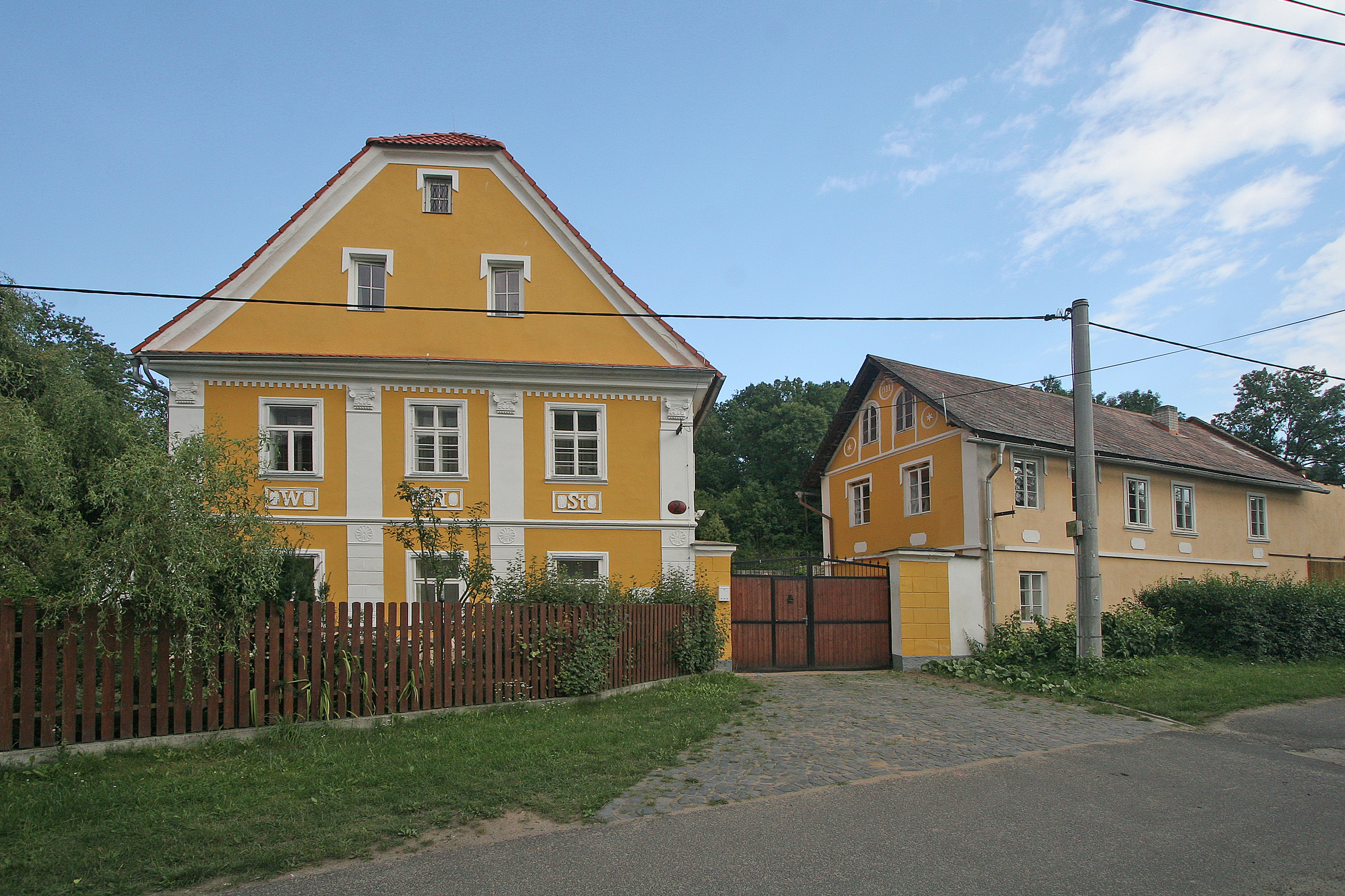 Vědlice čp. 2